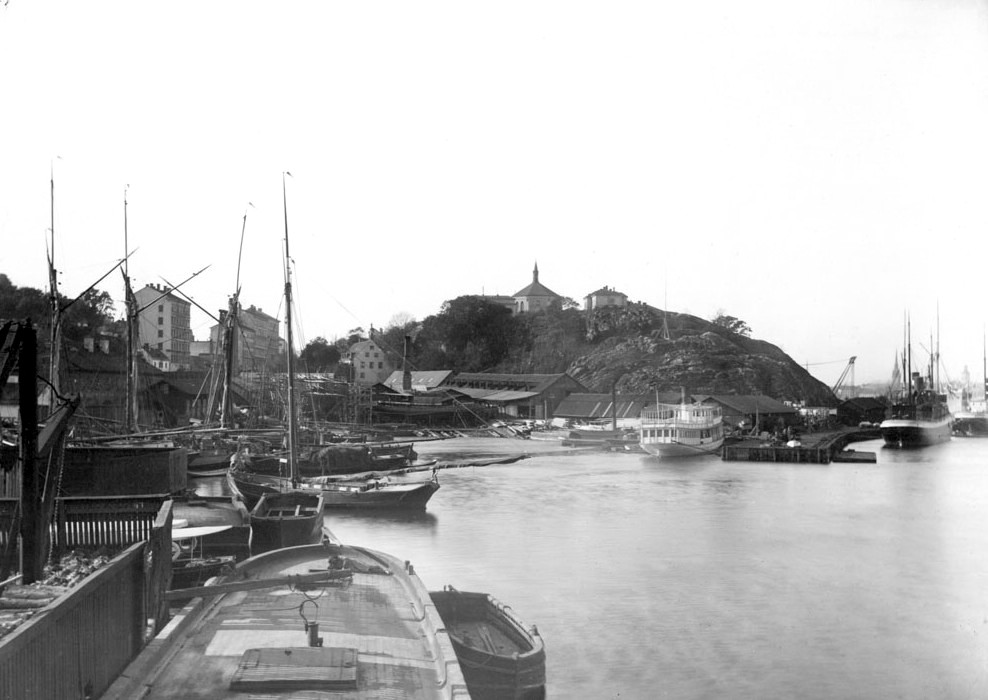 Tegelviken i Stockholm, vy mot väst, Ersta kapell på höjden i bakgrunden